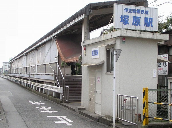 Tsukahara Station, on the Izuhakone Daiyūzan Line, Minamiashgara, Kanagawa 塚原駅